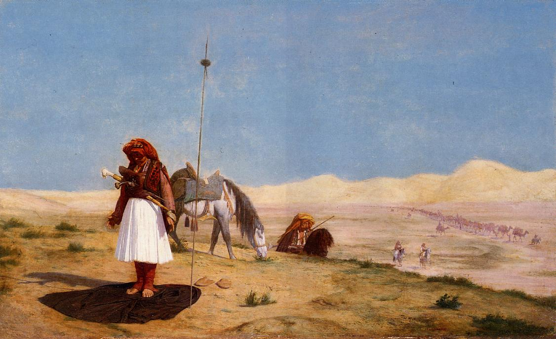 Albanian warior